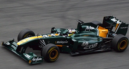 Ricardo Teixeira, Team Lotus